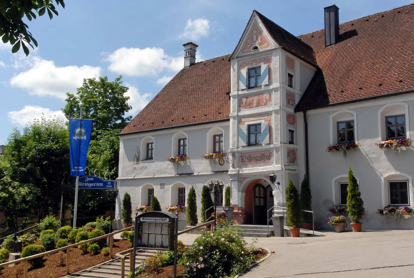 historischer Klostergasthof, Andechs